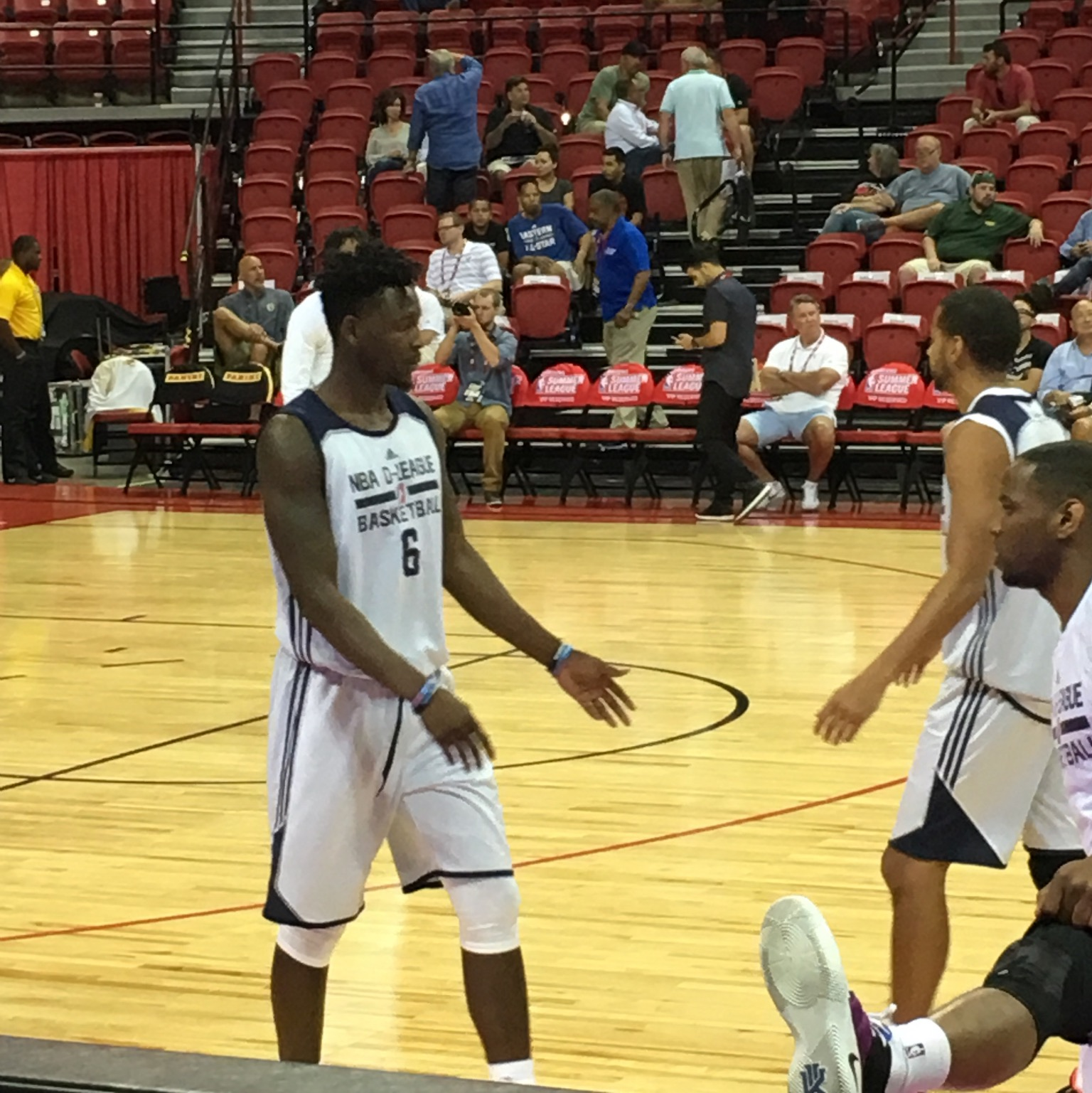 Talib Zanna 2016